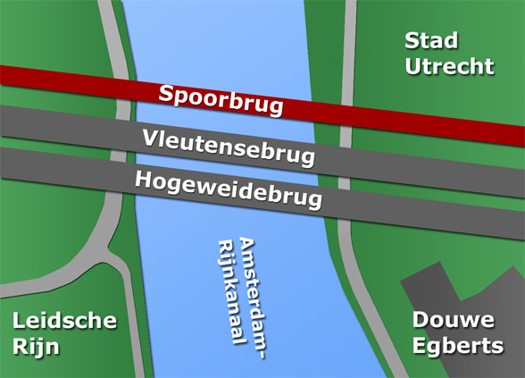 Situatieoverzicht vervanging Vleutensebrug door Hogeweidebrug